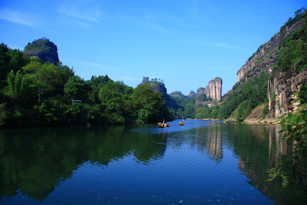 武夷山风景名胜区九曲溪——玉女峰